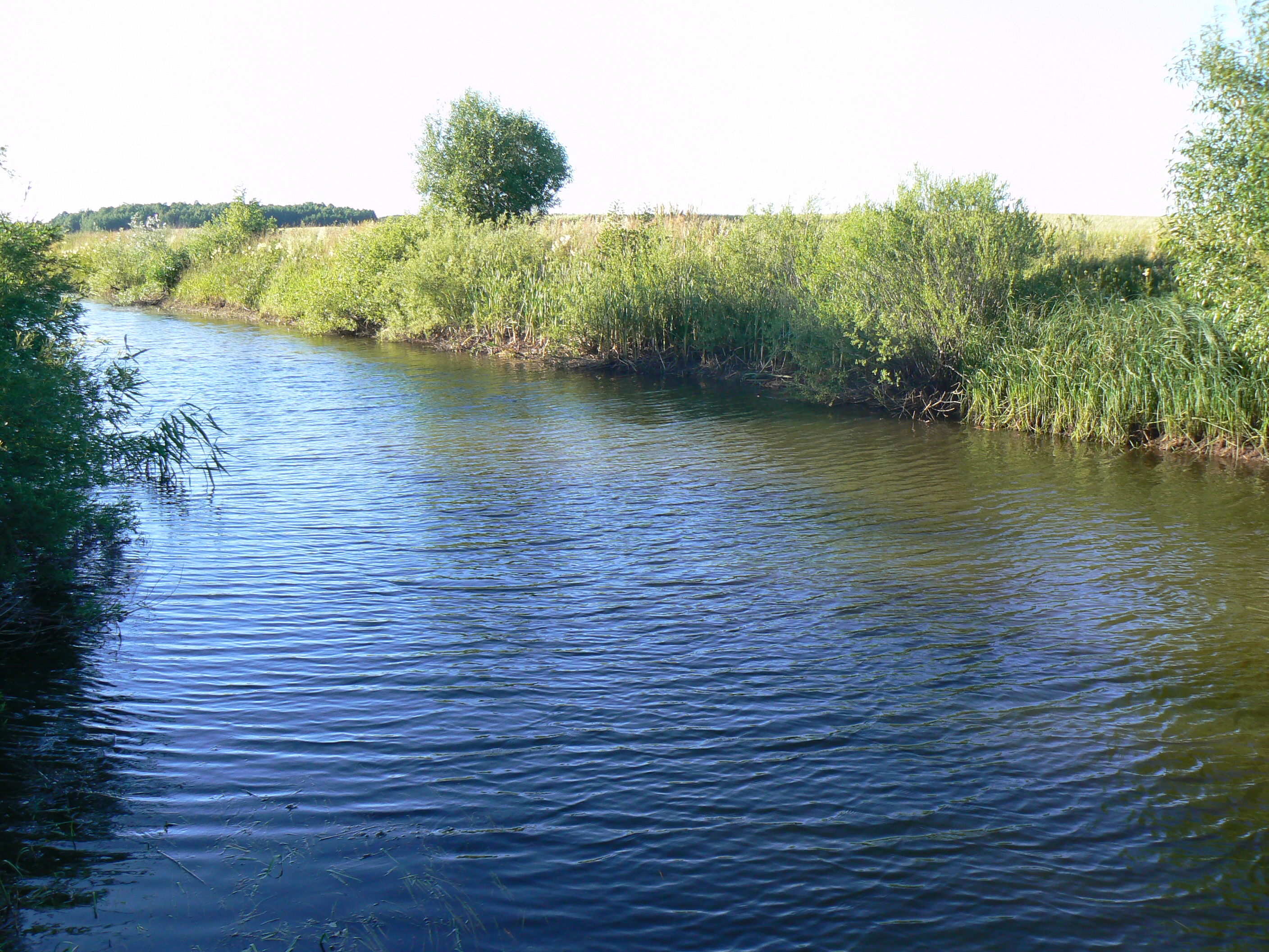 Říčka Baukštė 1 km severně od dálnice A1, MÚK Dauparai. Pohled po proudu, t.j. k severozápaduLietuvių: Baukštė prie Goberiškės